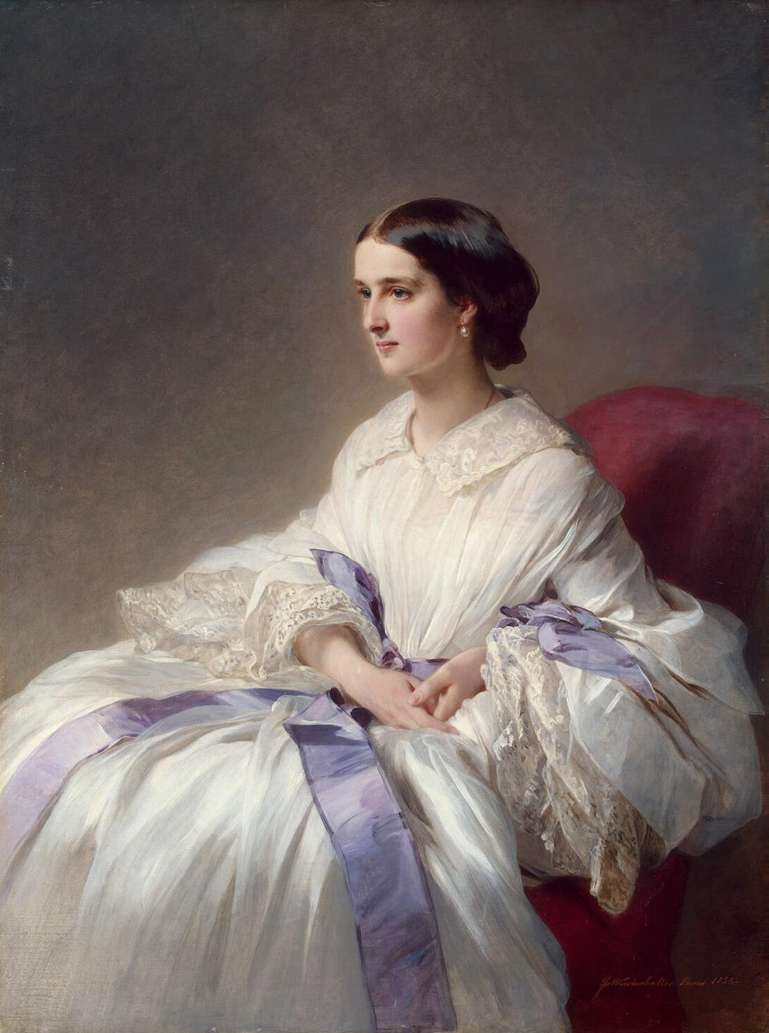 Винтерхальтер, придворный портретист короля Луи Филиппа и императора Наполеона III, особую популярность приобрел в период Второй империи (1852-1870), работая исключительно для высших слоев европейской аристократии. На одном из эрмитажных портретов кисти Винтерхальтера представлена Ольга Эсперовна Шувалова (1838-1869), урожденная княжна Белосельская-Белозерская, жена Петра Андреевича Шувалова, генерал-адъютанта, шефа корпуса жандармов. Хрупкая фигура Шуваловой буквально "утопает" в каскаде пышных складок изысканного платья. Несмотря на то, что художник не ставил перед собой задачу раскрыть психологический характер модели, в строгих чертах задумчивого лица Шуваловой угадываются ум, скромность и сдержанность представительницы одного из древнейших родов России.